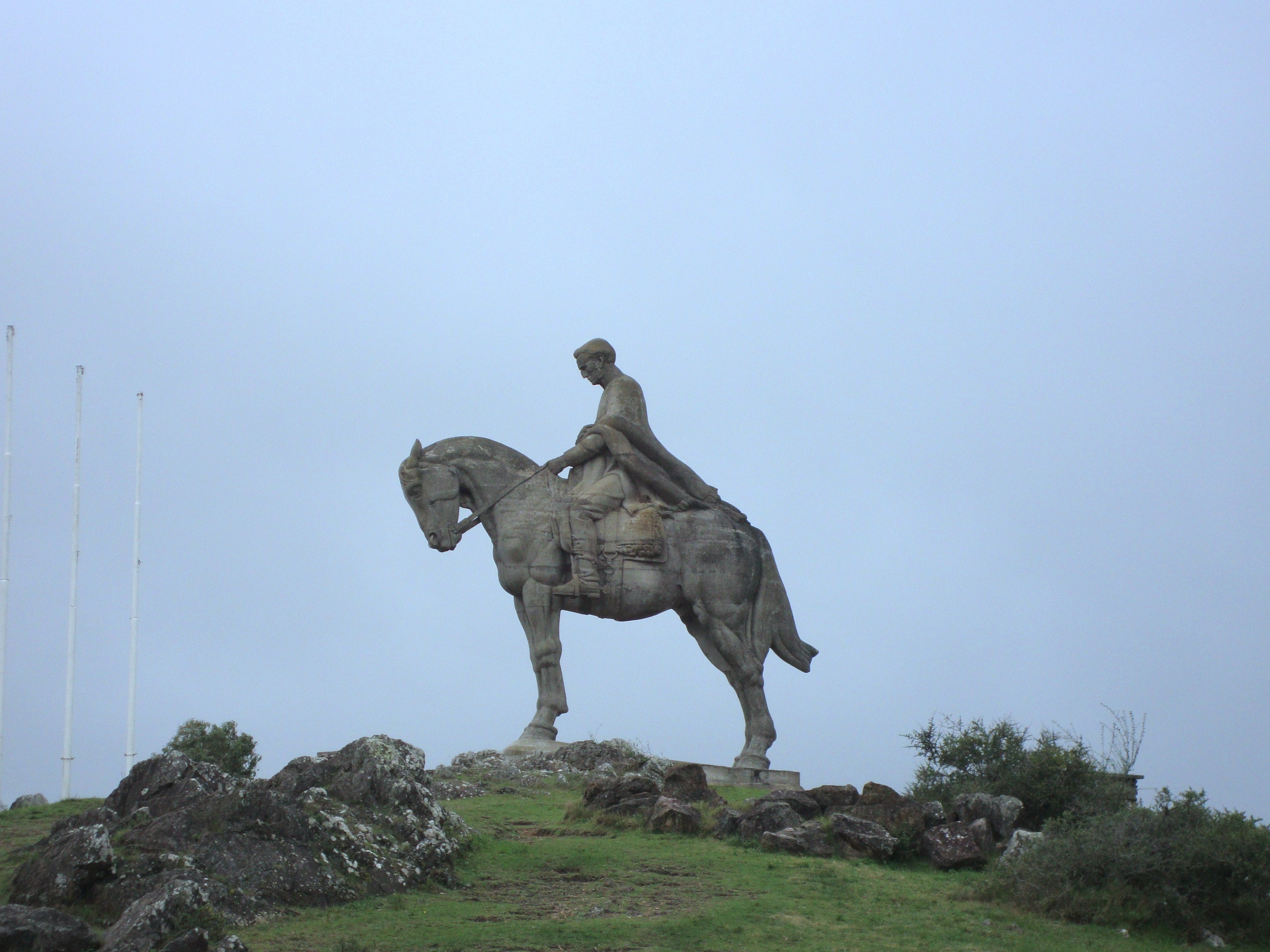 Monumento a Artigas (Cerro Ventura). Ubicada en el departamento de Lavalleja